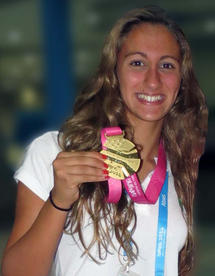 Simona Quadarella